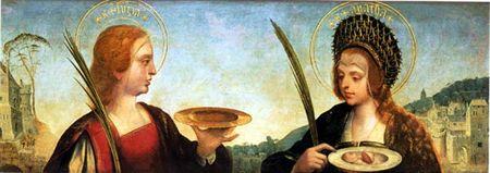 Este quadro, bem como "Santa Margarida e Santa Maria Madalena" (Museu Nacional de Arte Antiga), provem da ermida lisboeta do Paraíso. Duas outras pinturas que hoje se encontram no Museu de Posen, na Polónia ("Santa Apolónia e Santa Inês" e "Santa Catarina e Santa Bárbara"), com idêntico formato e composição, foram compradas em Lisboa no ano de 1844 pelo Conde Atanazy Raczynski, tendo pertencido à Galeria do Marquês de Penalva. Carl Justi atribuíu este conjunto a Velascus e José de Figueiredo, aludindo às pinturas de Posen, menciona o nome de Cristóvão de Figueiredo. Luís Reis-Santos lançou a hipótese de as quatro pinturas terem constituído as predelas do retábulo "do Paraíso" [Museu Nacional de Arte Antiga] atribuído a Gregório Lopes. Vítor Serrão (in catálogo da exposição No Tempo das Feitorias) subscreve a opinião de Reis-Santos, integrando-os na obra de Gregório Lopes.